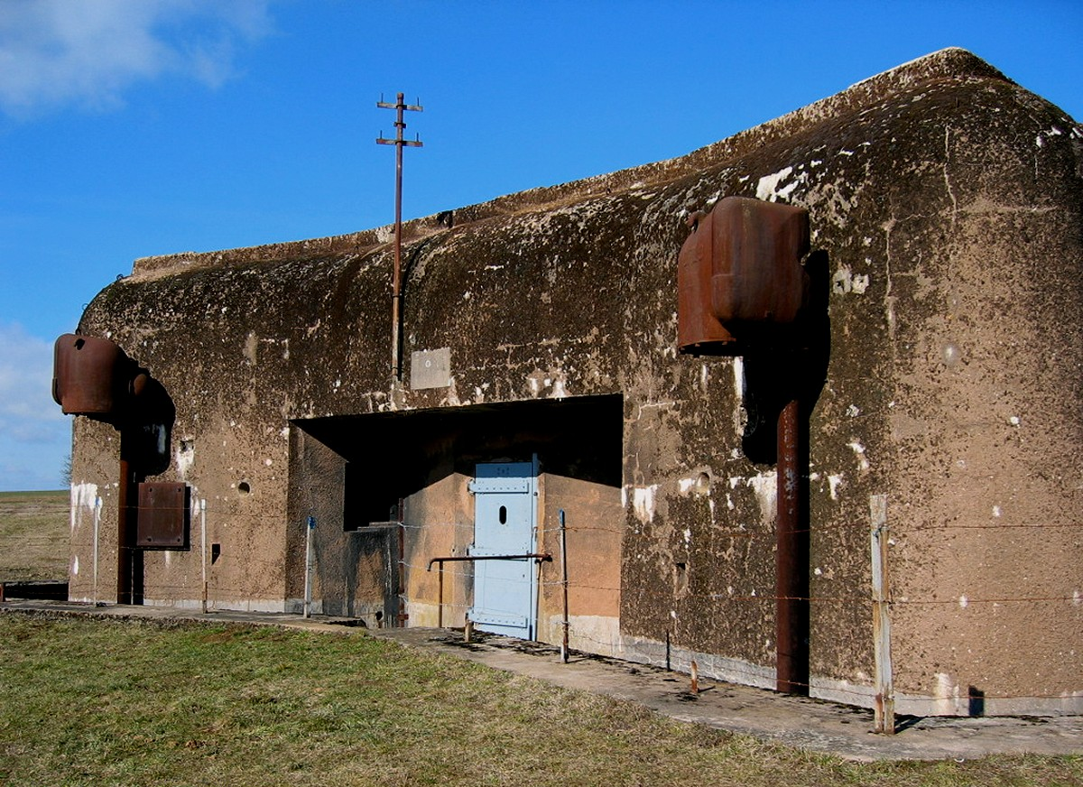 Casemate du Grand Lot - Ligne maginot